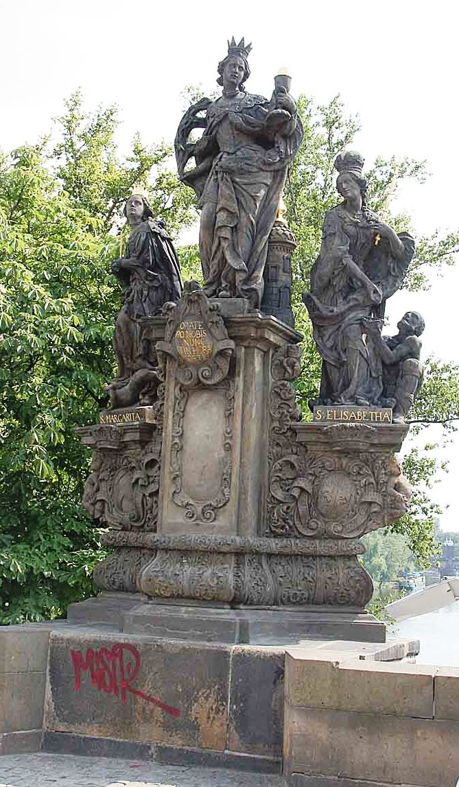 Sousoší svaté Barbory, Markéty a Alžběty na Karlově mostě